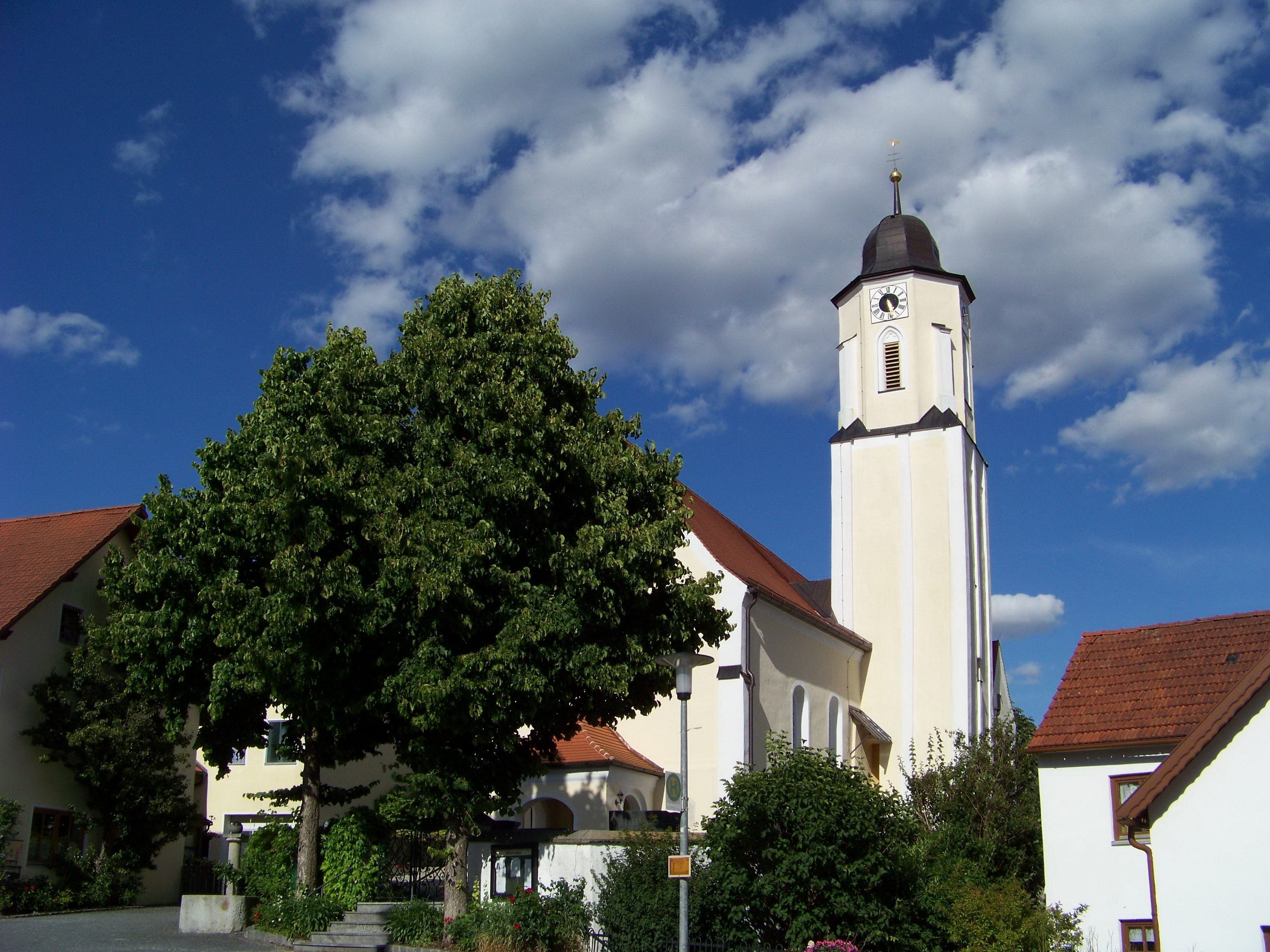 Rottenburg an der Laaber. Münster 36. Kirche St. Peter. Langhaus und Turmunterbau romanisch, Chor und Turmaufbau um 1500; mit Ausstattung.